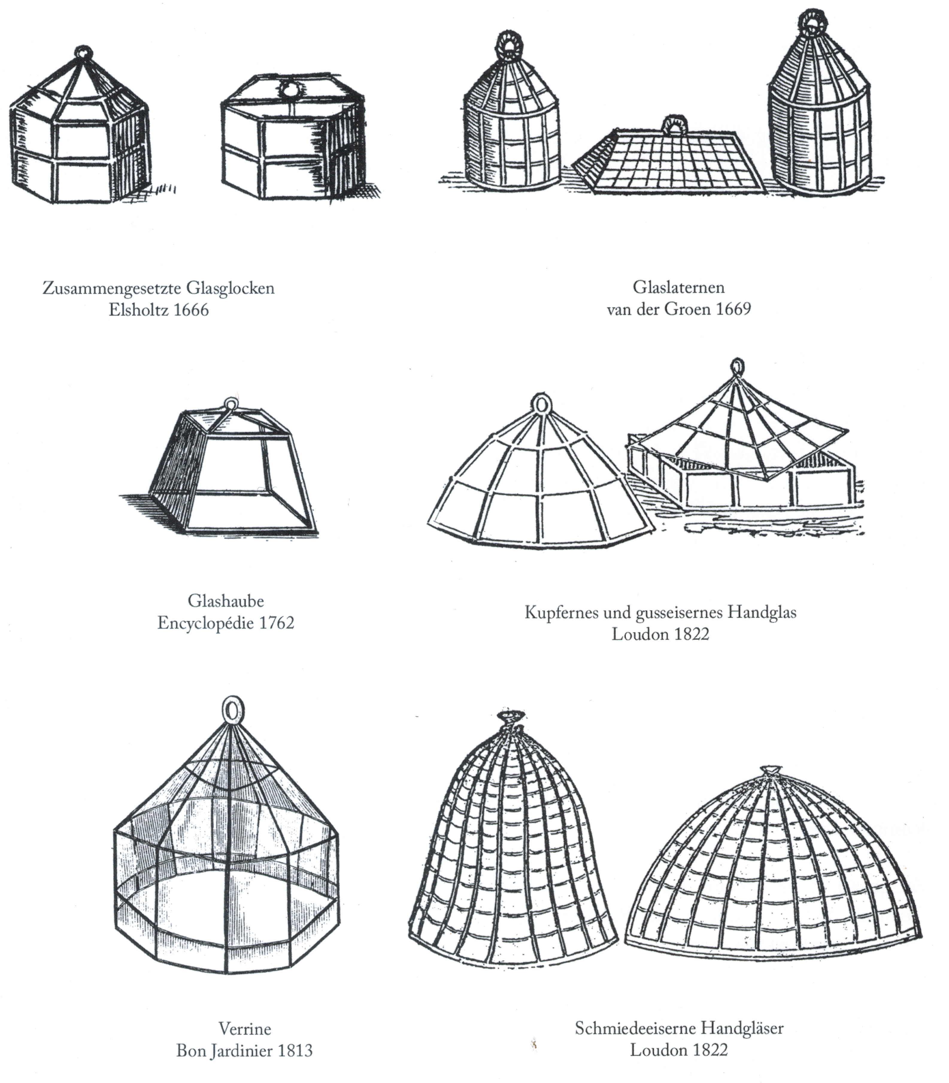 verschiedene Bleiglashauben (jeweils mit genannter Quelle)